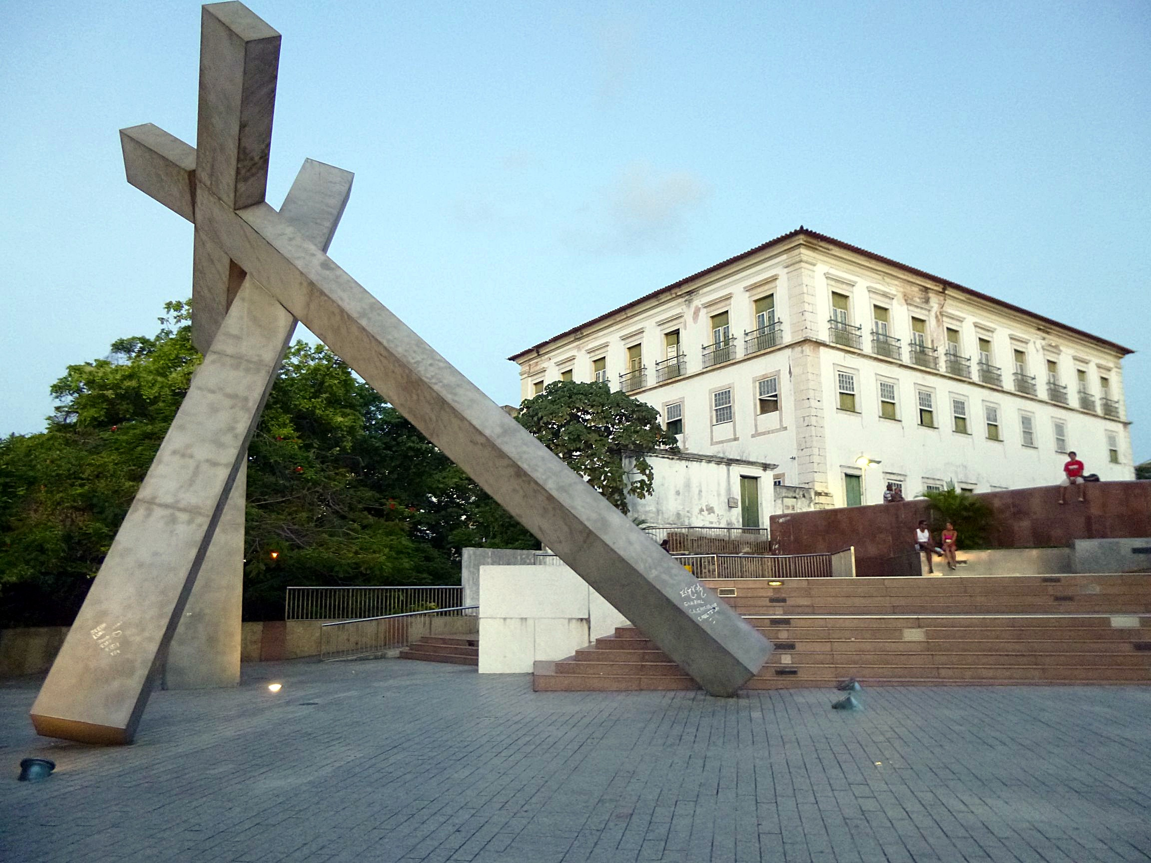 Cruz Caida Domplatz Salvador